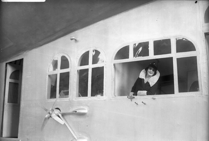 Zum Weltflug-Start des "Graf Zeppelin". Die englische Journalistin Lady Drummond Hay, die einzige weibliche Passagierin, welche den Weltflug mitmacht.